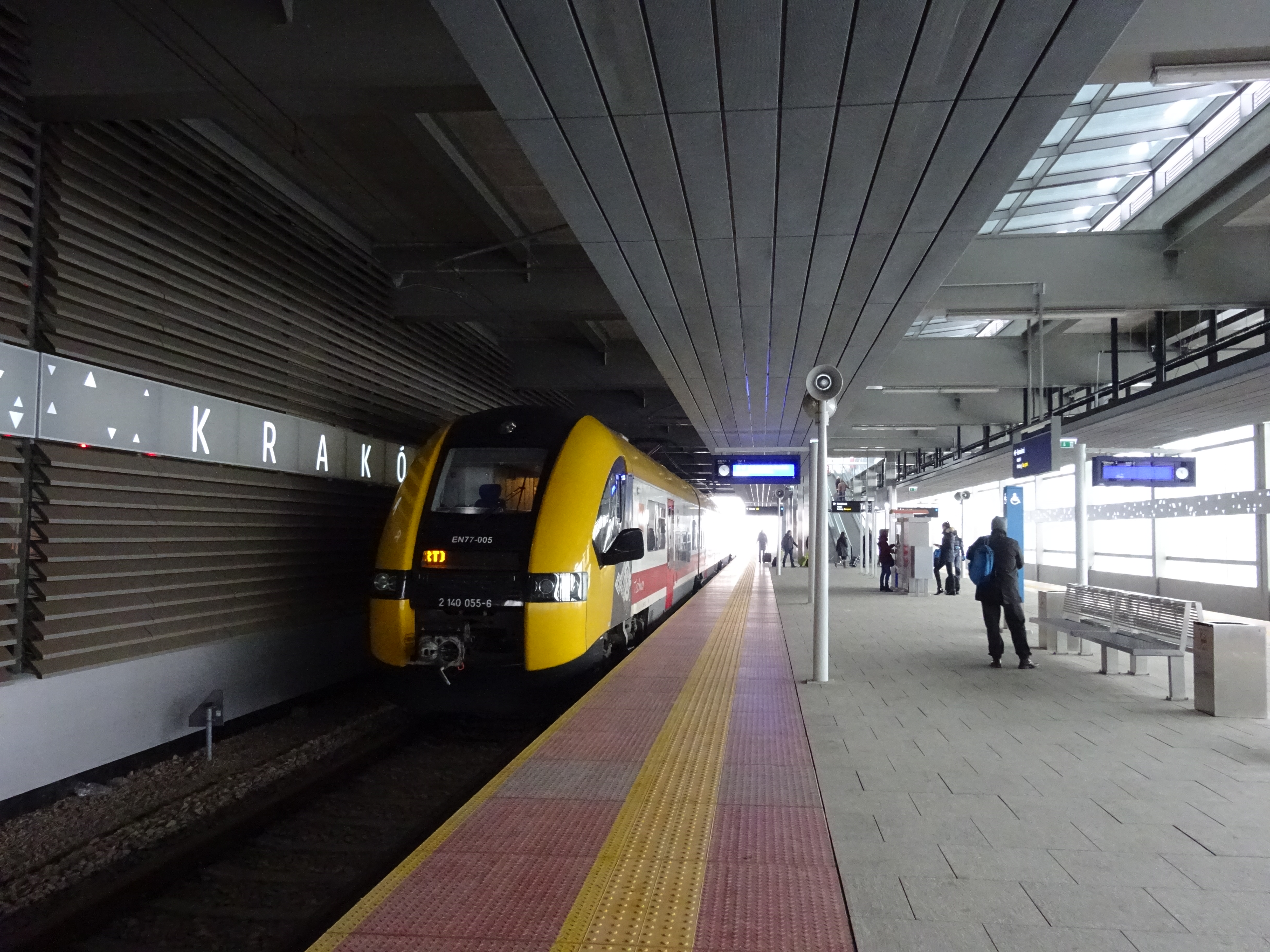 Pesa Acatus II na stacji "Kraków Lotnisko" przy Porcie Lotniczym Kraków-Balice. 2016